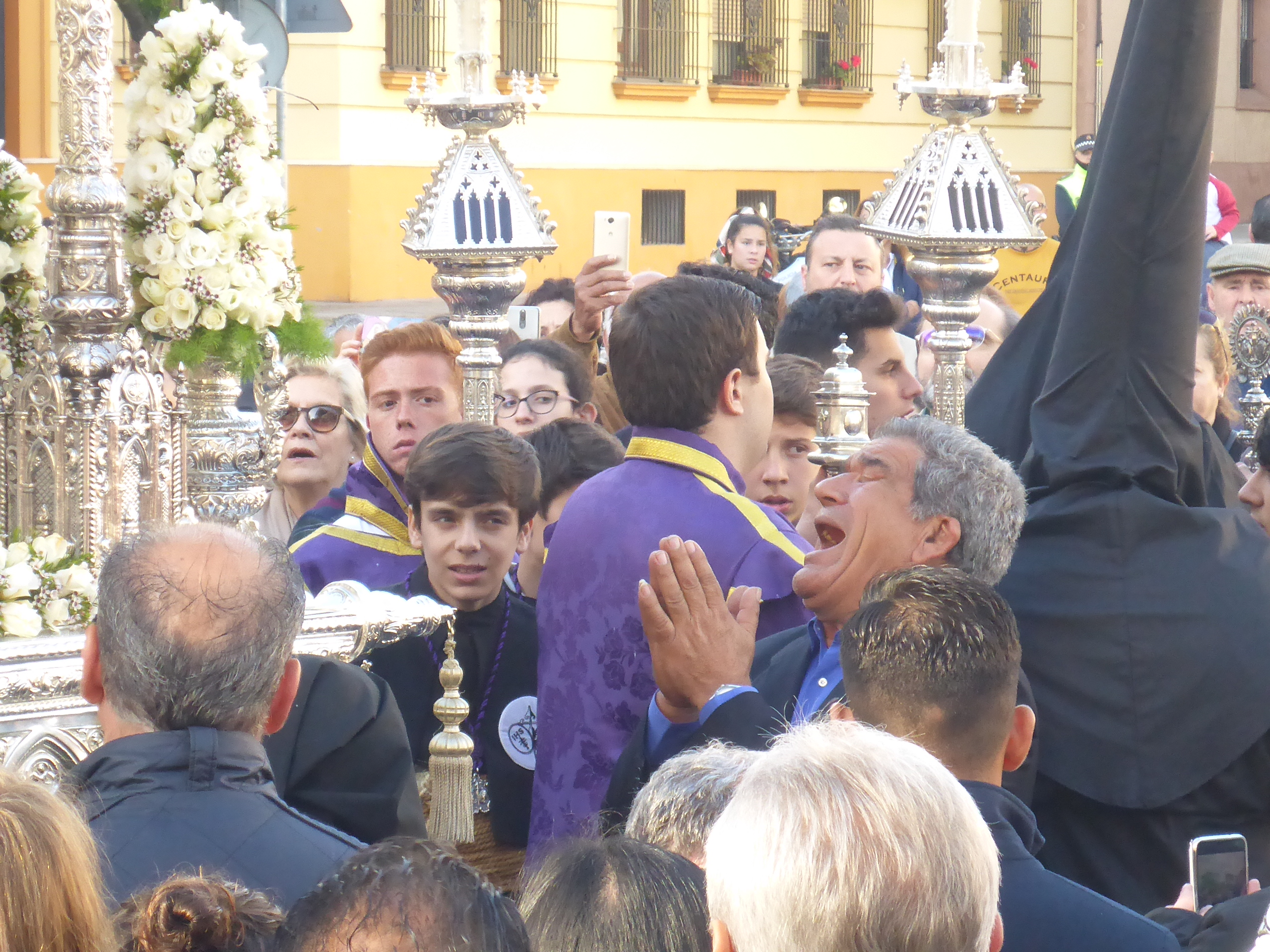 Viernes Santa 2019 en Jerez de la Frontera (Andalucía, España)